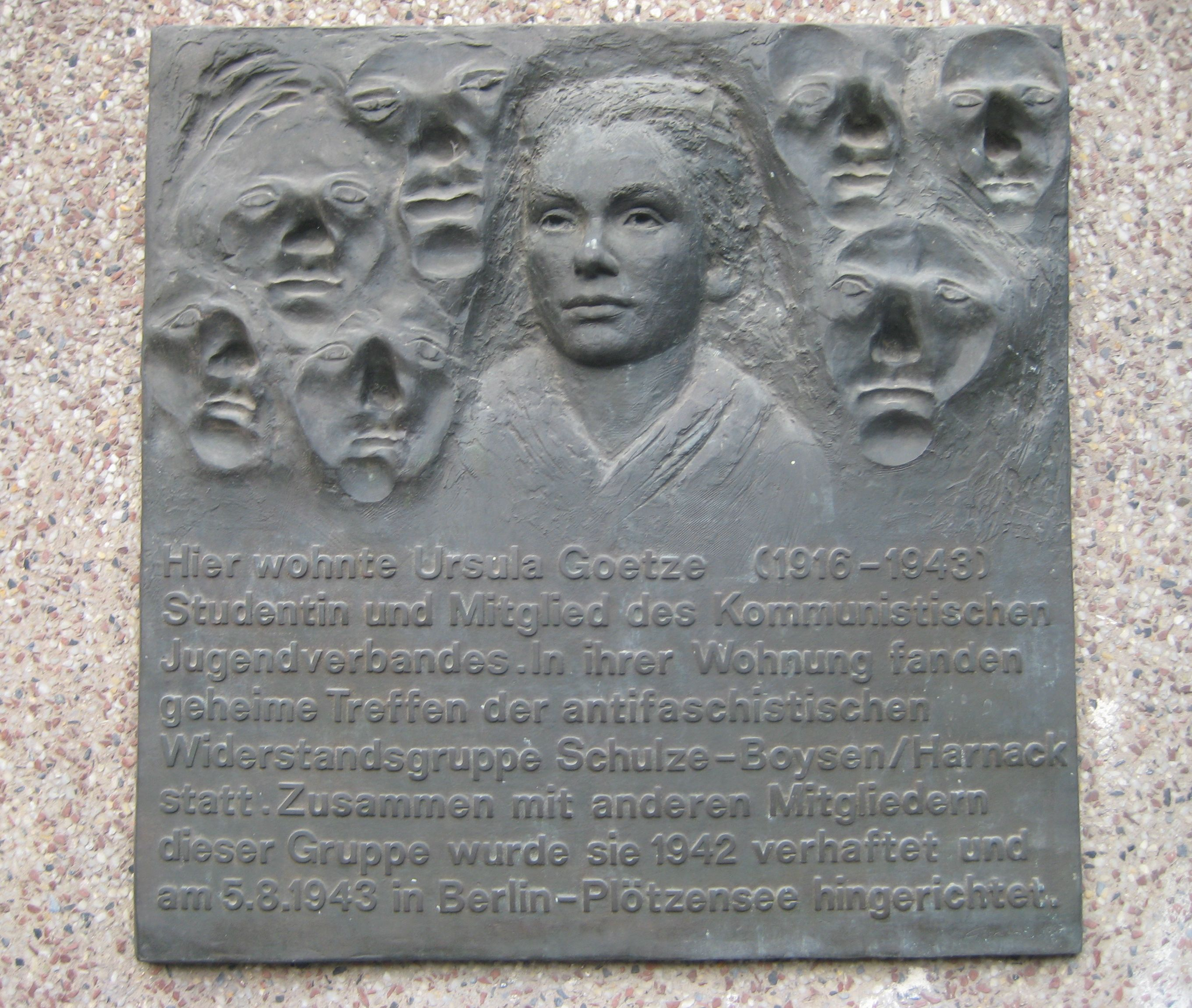 Gedenktafel für Ursula Goetze, kommunistische Widerstandskämpferin im Nationalsozialismus, Haus Hornstraße 3, Berlin-Kreuzberg; Tafel gestaltet von Christa Ludwig (1987)/commemorative plaque for Ursula Goetze, communist resistance fighter under National Socialism. Sculpted by Christa Ludwig, 1987